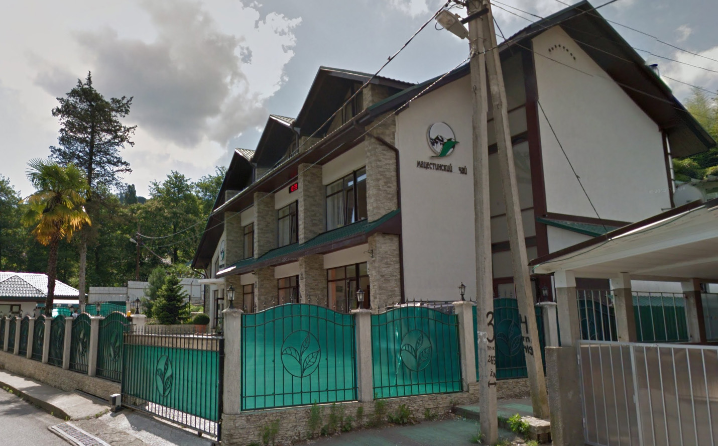 Мацестинский чай